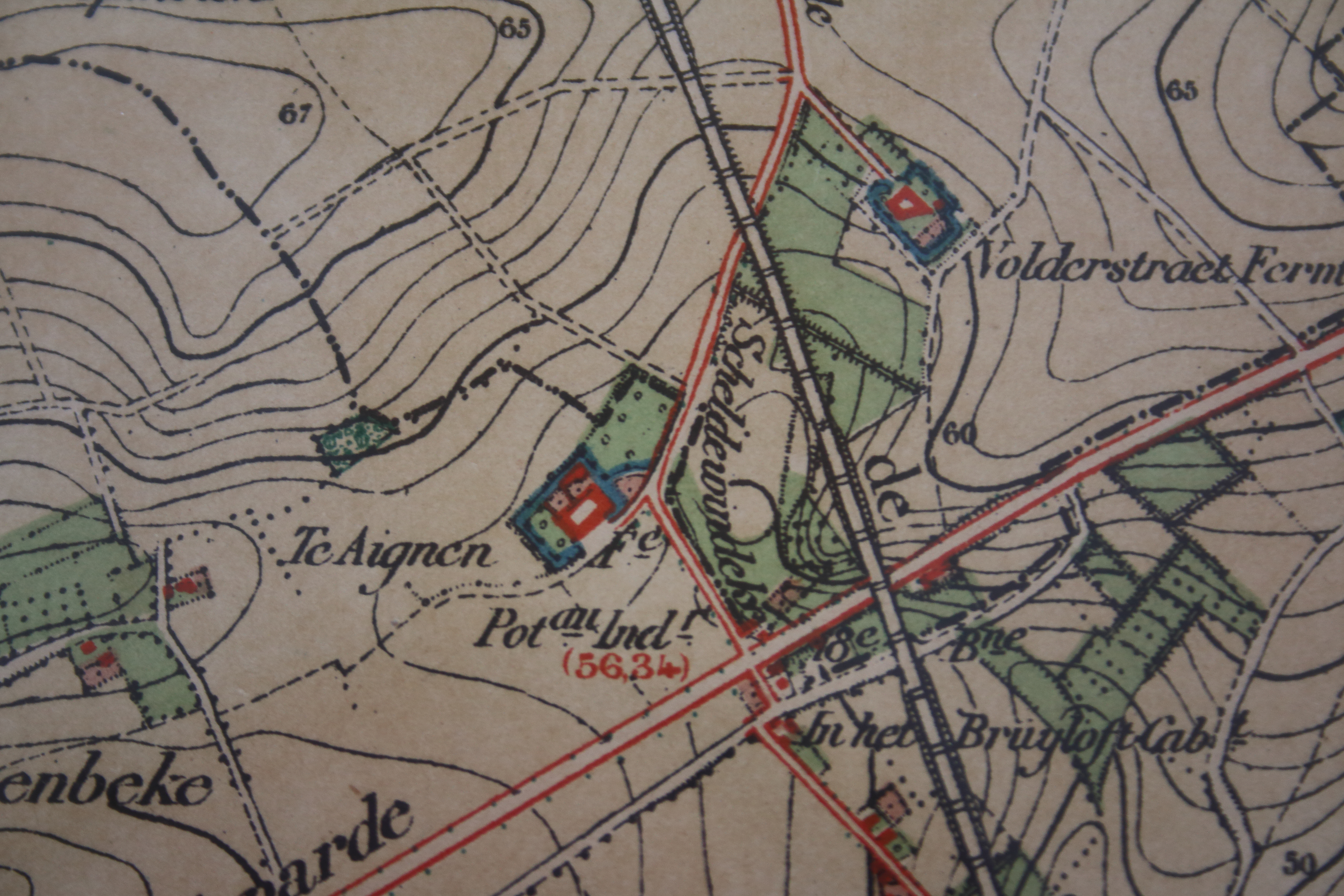 Hof van Oranje, Velzeke-Ruddershove, Zottegem, Vlaanderen, België